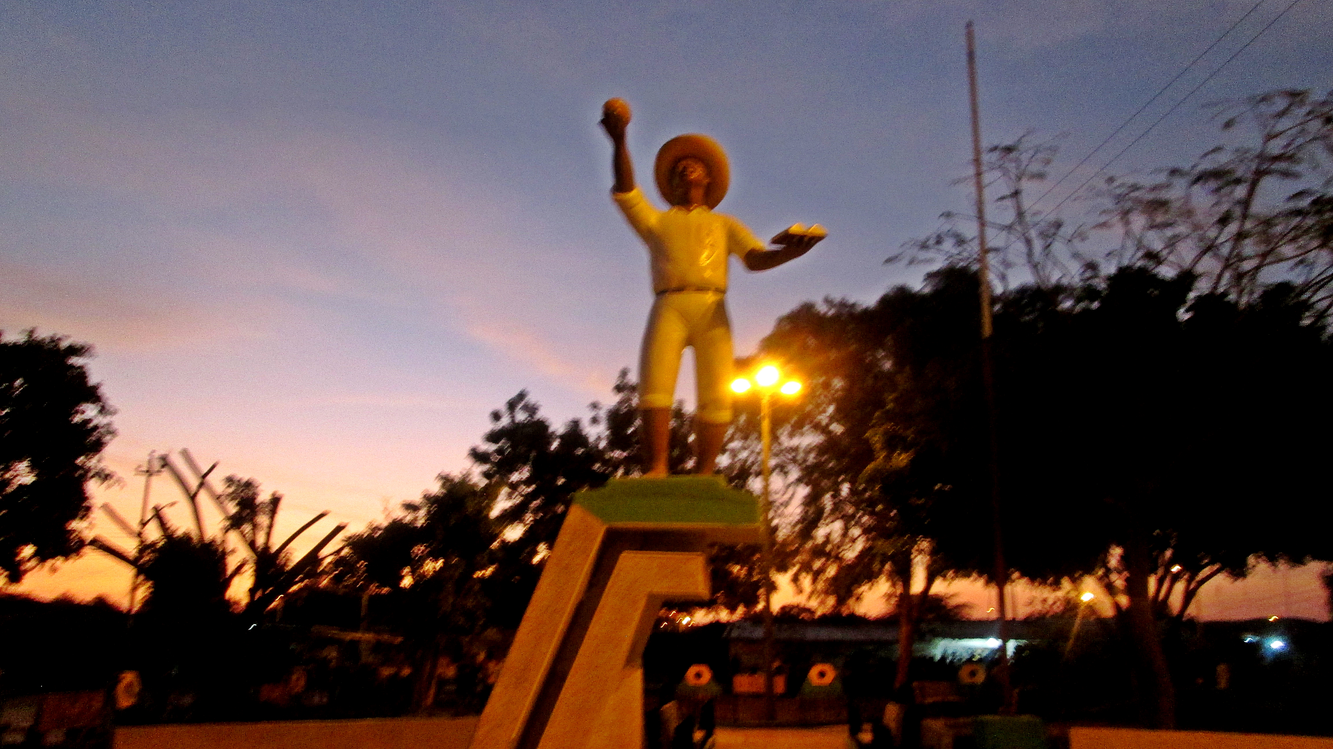 Plaza de Yapatera en Piura.